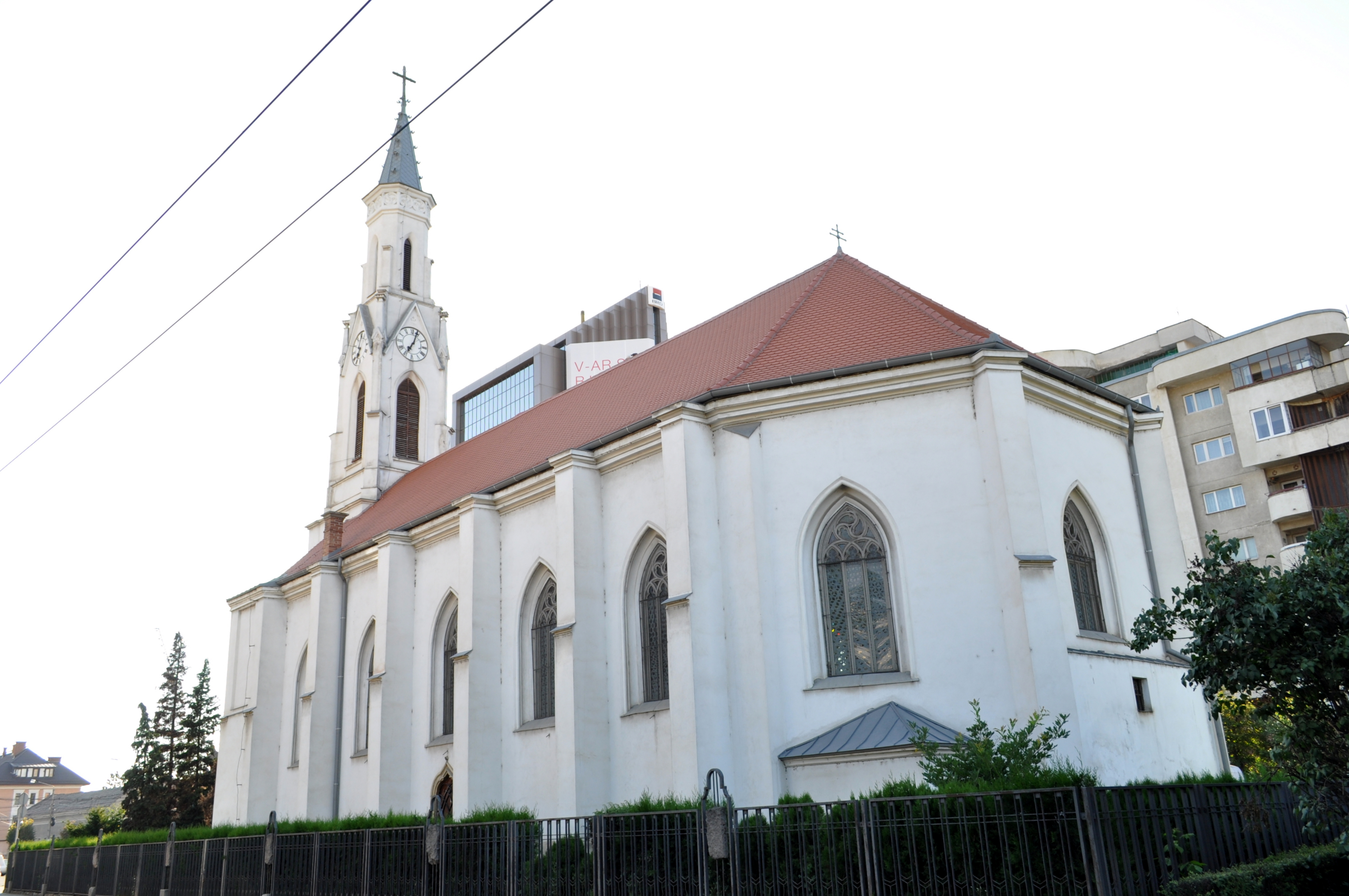 Biserica romano-catolică "Sf. Petru"